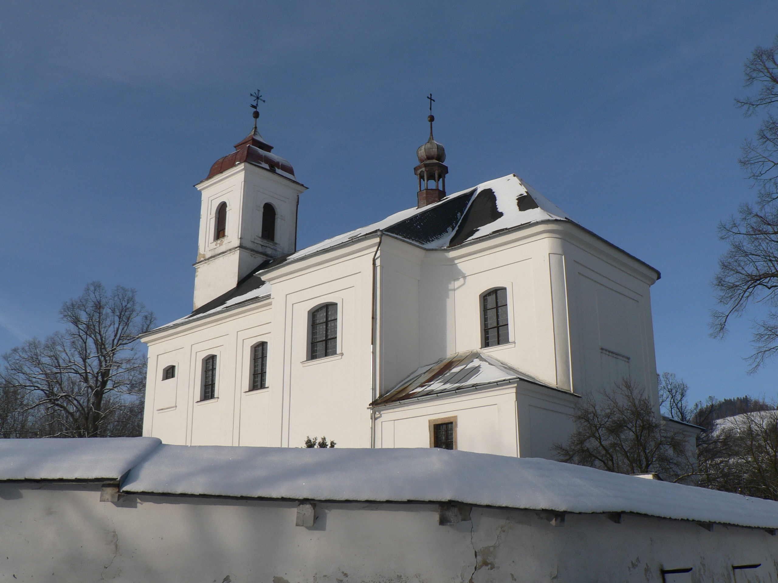 Kostel svatého Linharta (Vysoké Žibřidovice)